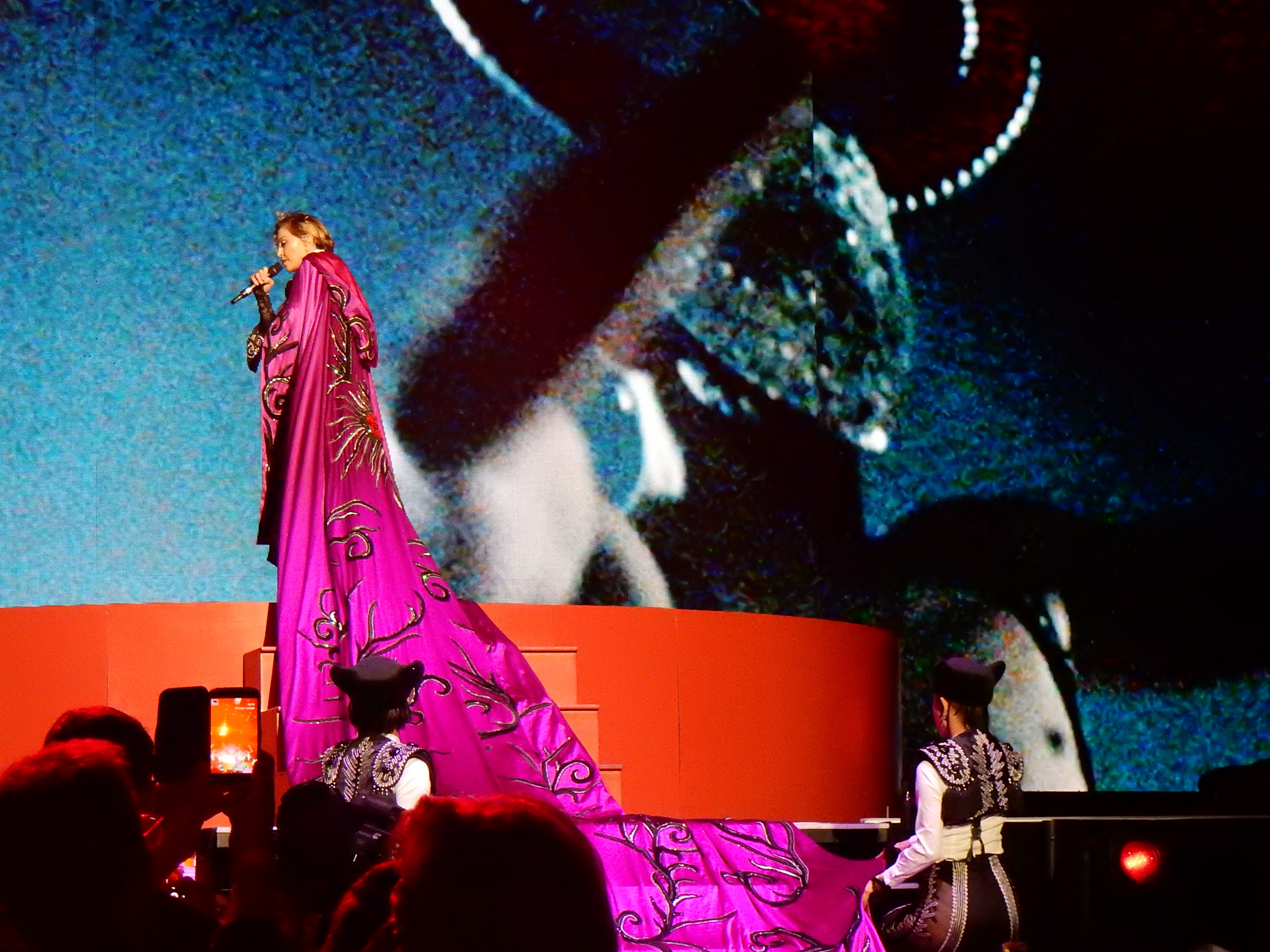 Madonna - Rebel Heart Tour 2015 - Mannheim